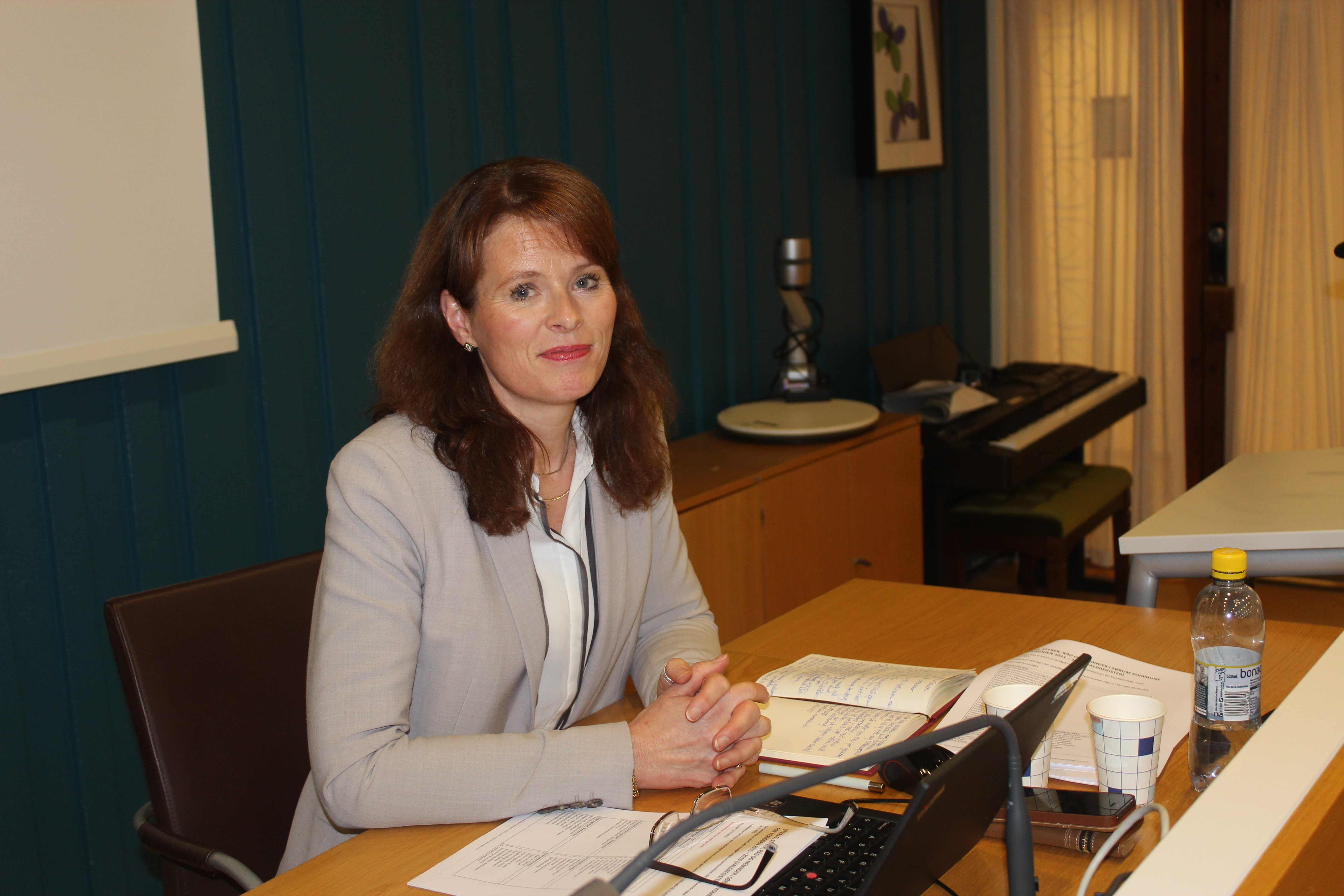 Siri Gauthun Kielland, rådmann i Sørum (2015)